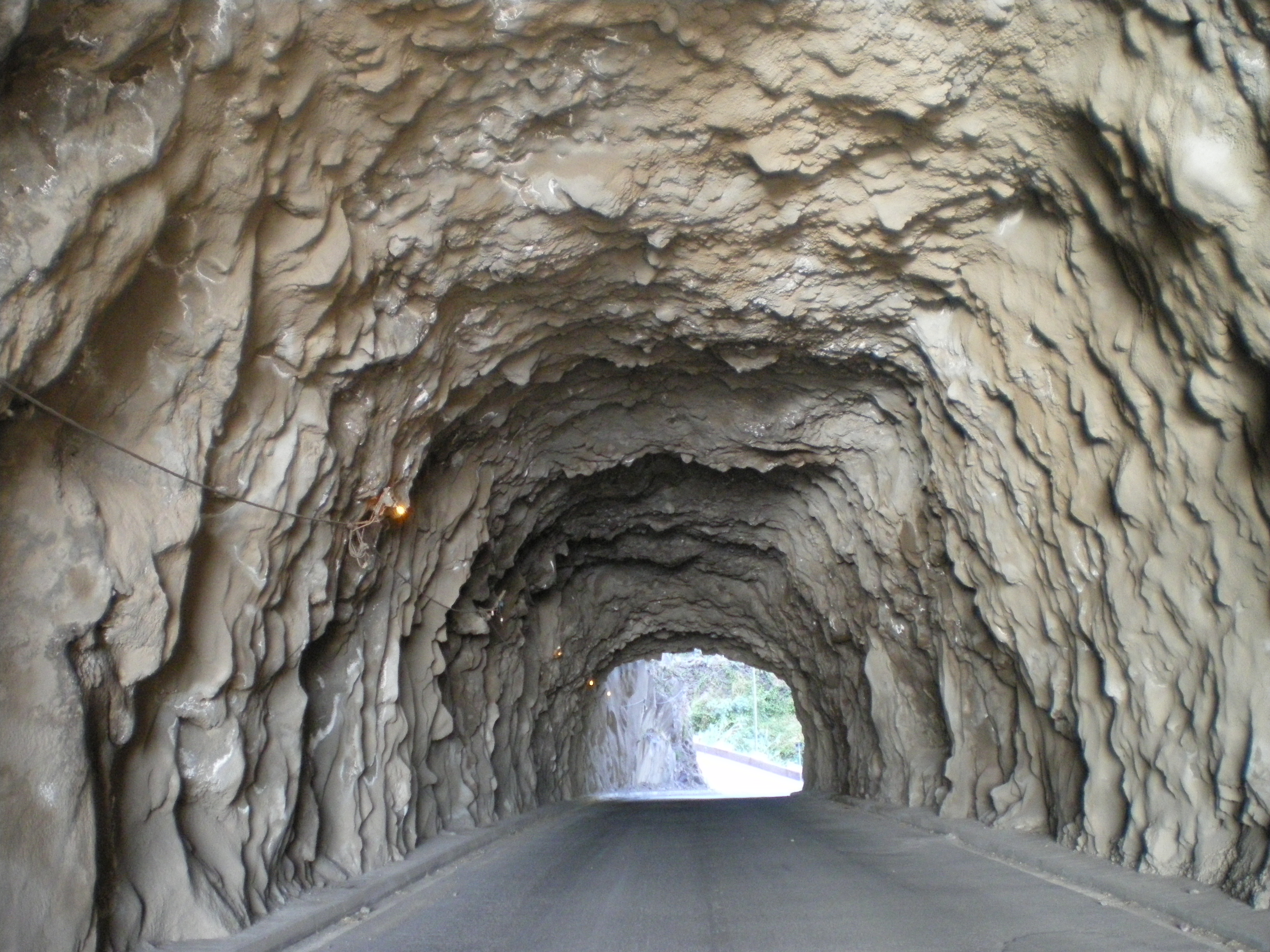 Traditionell gebauter Tunnel bei Ponta Do Sol (Madeira)